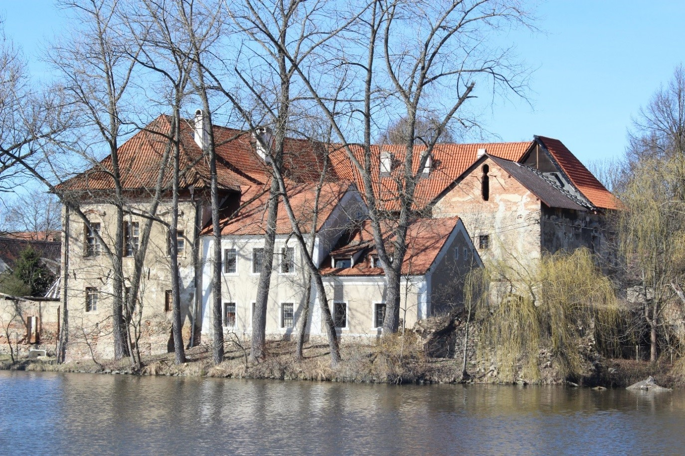 Vodní tvrz Popovice (okres Benešov) Tvrz Popovice (Benešov) je vynikající ukázkou vývoje panského sídla od tvrze k renesančnímu a baroknímu zámečku. Pohled na tvrz z hráze Popovického rybníka ve směru na severozápad. V době vegetačního klidu je ze severního konce hráze z jihu viditelné: západní křídlo (vyšší budova vlevo), navazující hospodářské budovy tvrze (dvě nižší budovy s bělošedou novou fasádou). Zcela vlevo je torzo cihlového zdiva odstraňované novodobé budovy lihovaru. Vpravo je viditelná jižní a východní stěna věže. Snímek ukazuje stav obnovy popovické tvrze před zahájením I. etapy akce navýšení věže (snesení novodobého zdiva věže a štítu jižní stěny, původní gotické zdivo bude nadezdíváno 2, 2 m nového zdiva, na které bude osazen již zhotovený krov. Na snímcích je též patrné výškový rozdíl mezi nově zastřešenou střechou západního a severního křídla (nová krytina) a provizorním zastřešení věže Vodní tvrze Popovice. Snímek ukazuje, že z jihu obranný systém tvrze tvořil Popovický rybník (nazývaný dříve Mlýnský, někdy též Zámecký rybník), z jehož hráze je snímek pořízen.